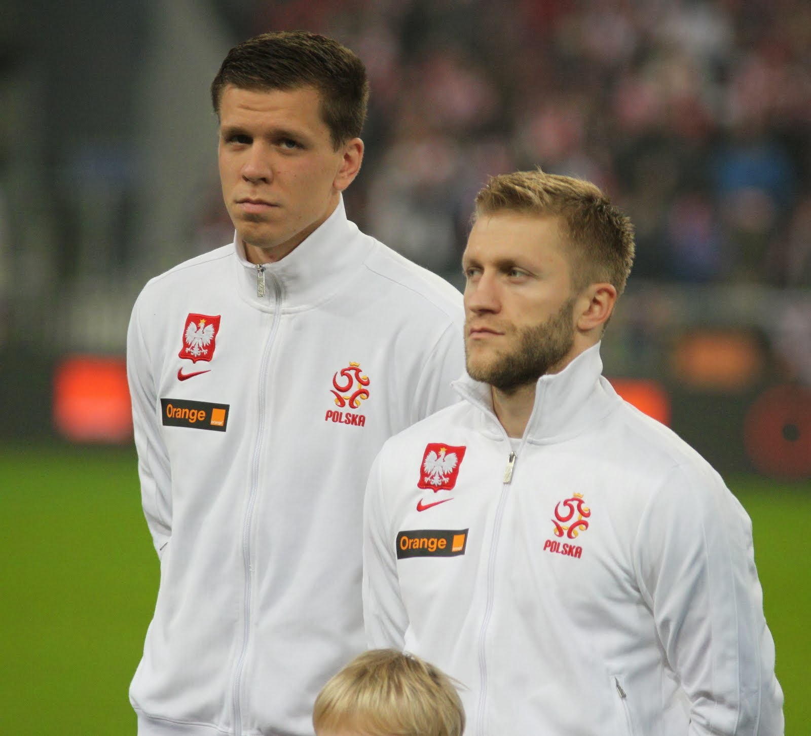 Wojciech Szczęsny i Jakub Błaszczykowski przed meczem towarzyskim z reprezentacją Irlandii w listopadzie 2013.